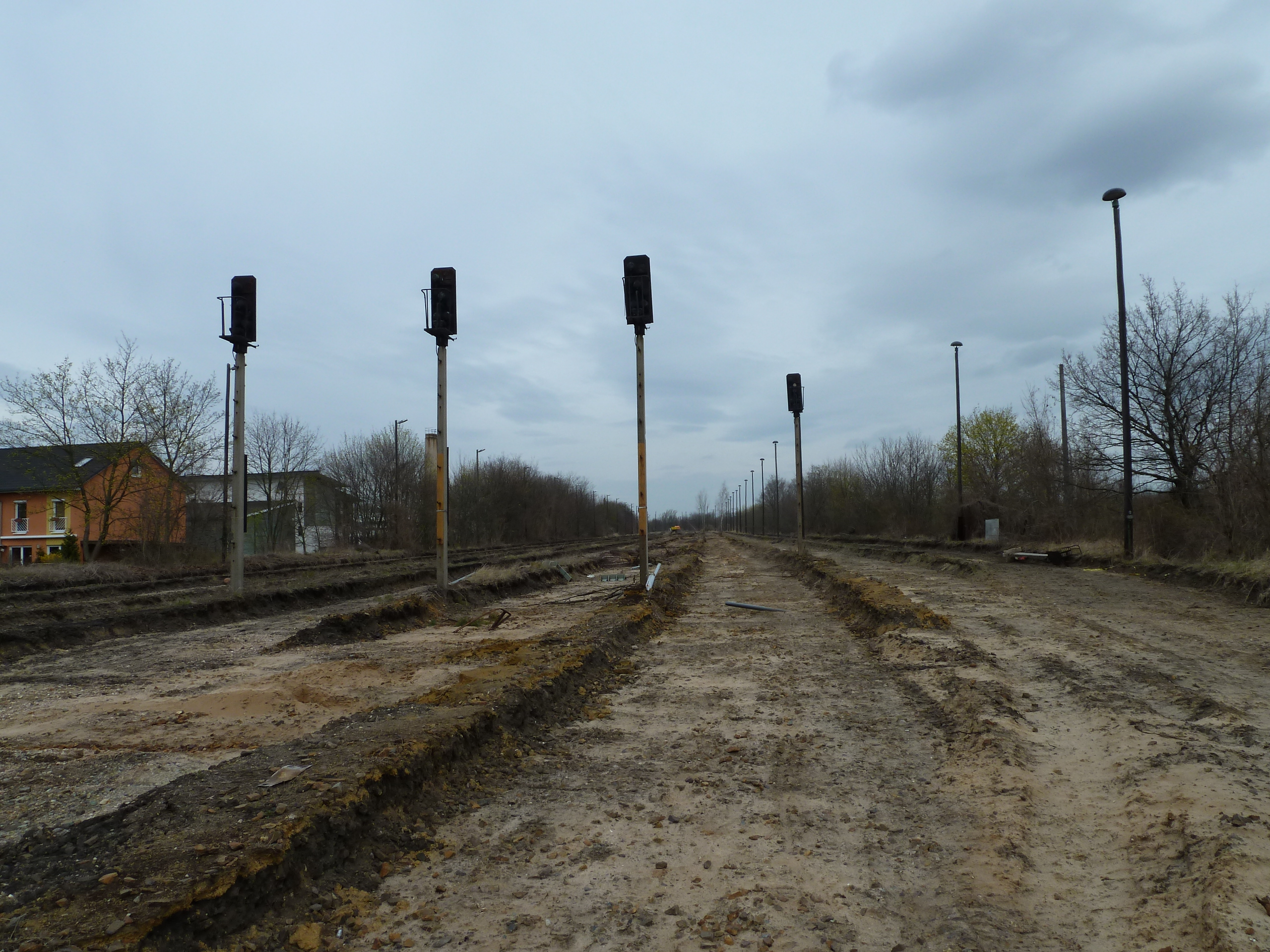 Frankfurt (Oder) Rangierbahnhof, Ausfahrtsgruppe in Richtung Süden